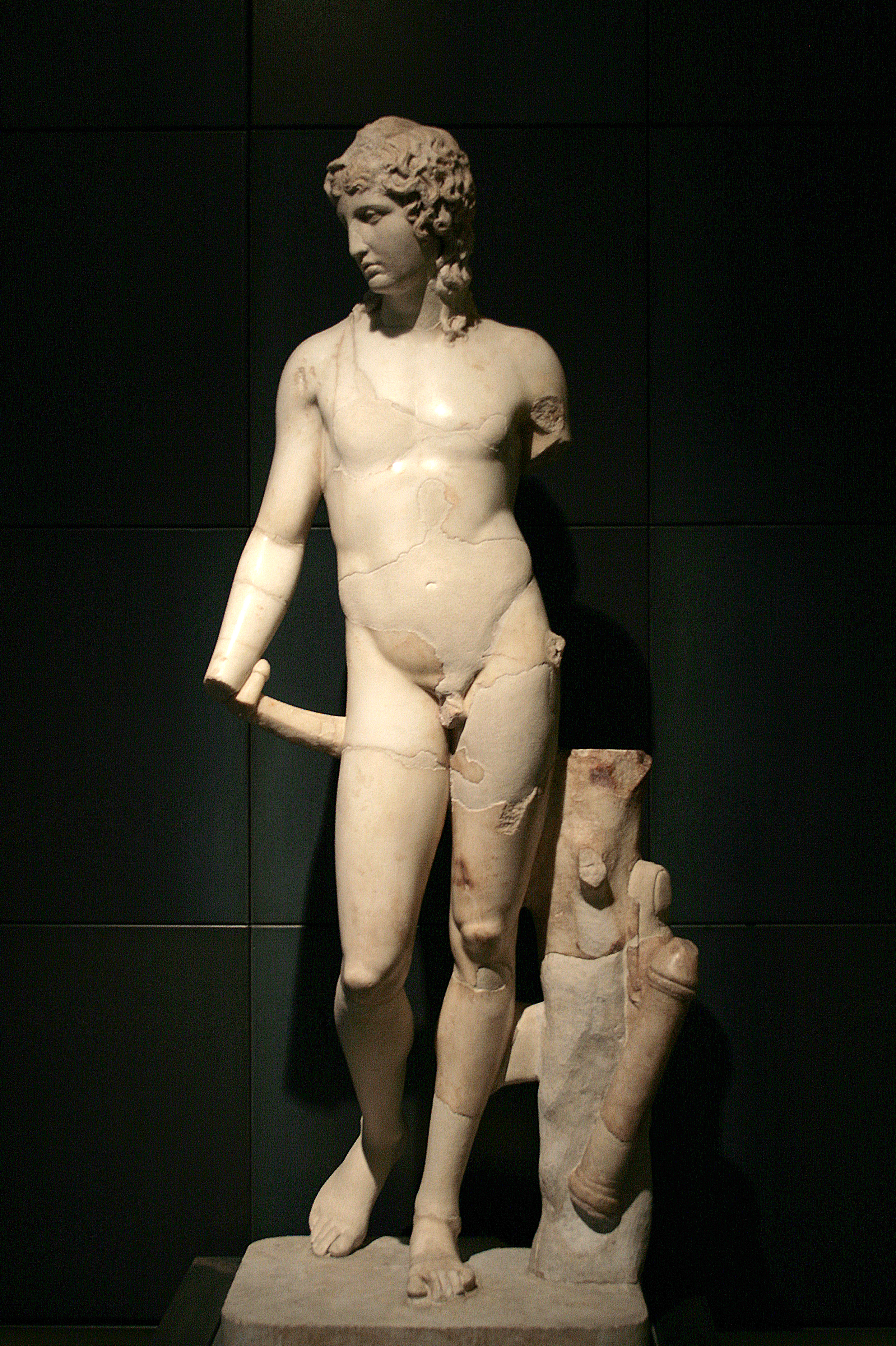 Statue d'Éros du type de Centocelle. Copie romaine de l'époque antonine d'un original grec du second classicisme.